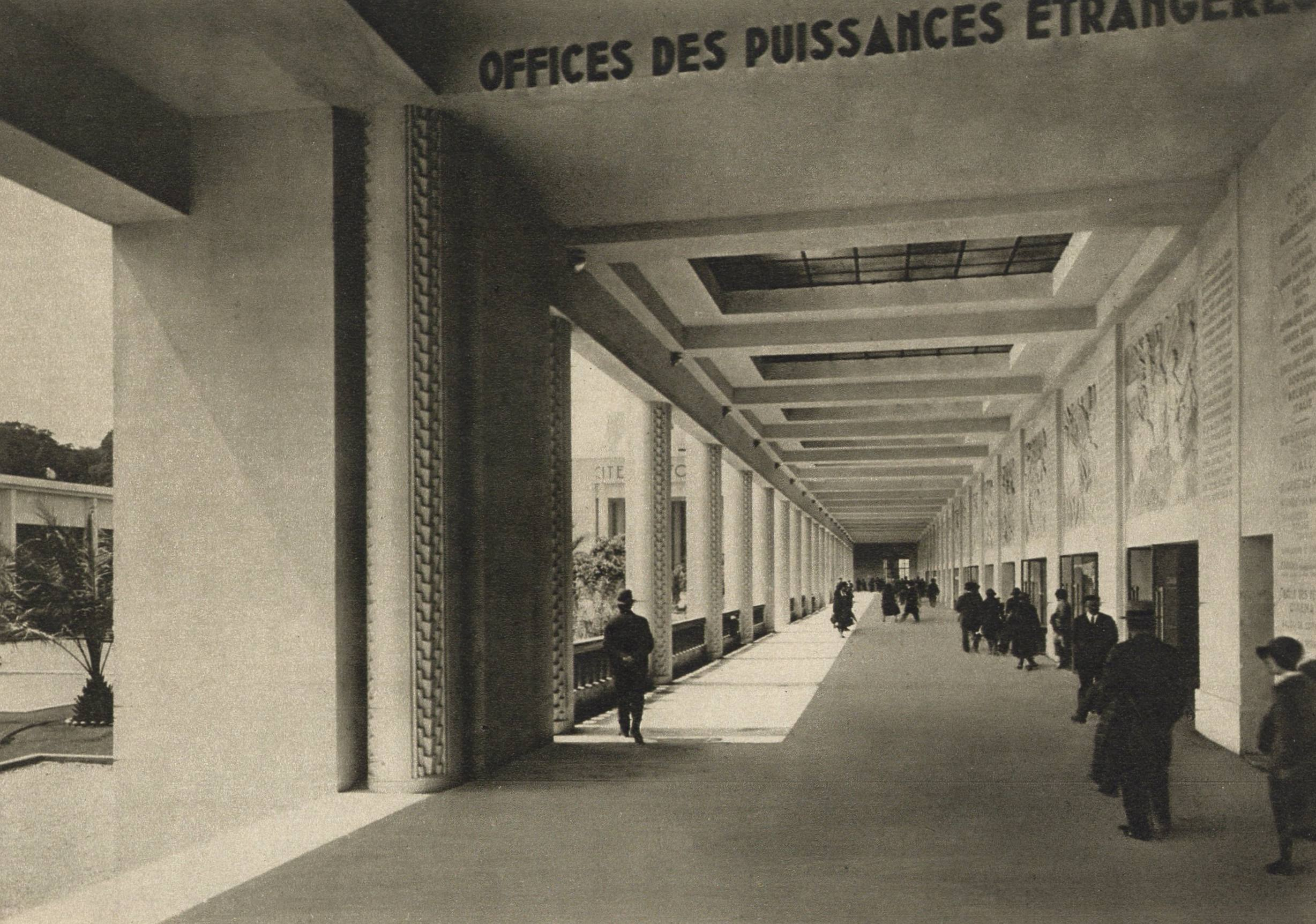 Une des ailes de la Cité des Informations à l'Exposition Coloniale de Paris en 1931